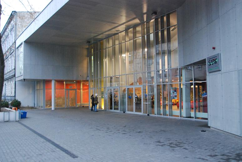 Szczecinek, ul. kard. Stefana Wyszyńskiego 65 - Kino Wolność